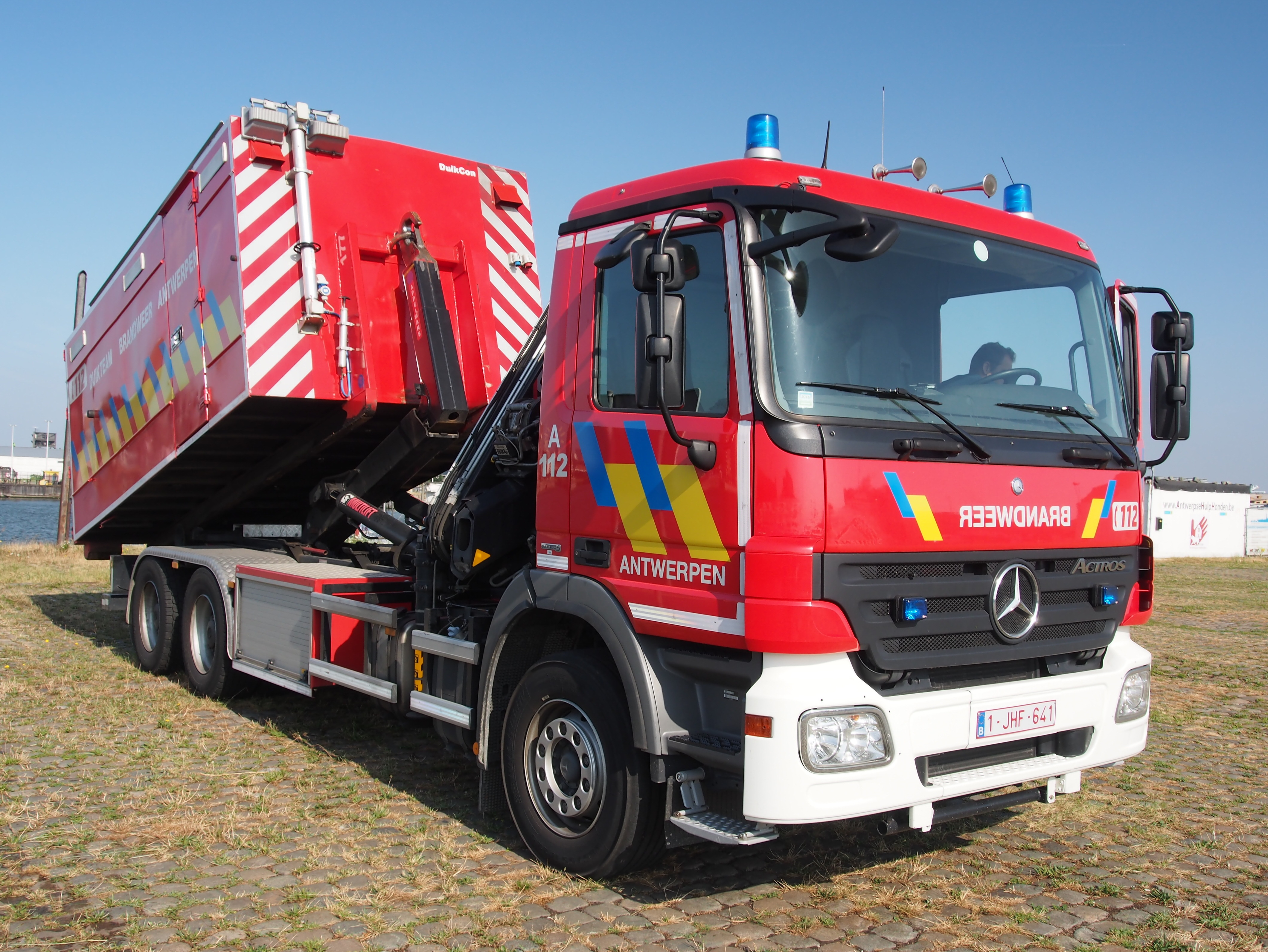 Brandweerwagens Brandweer Antwerpen in de Antwerpse haven.